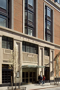 Entrance to Feil Hall